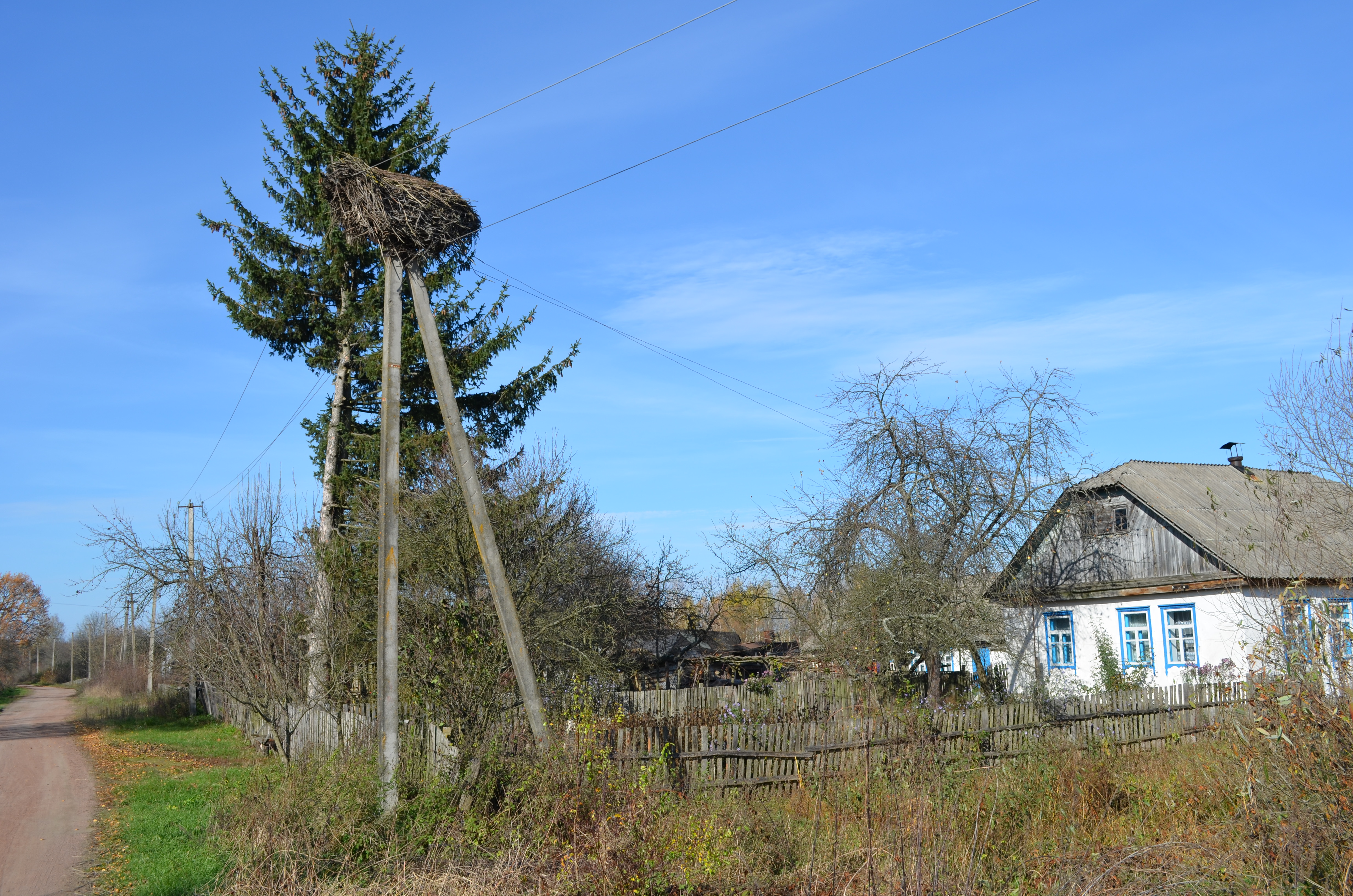 с. Піски.